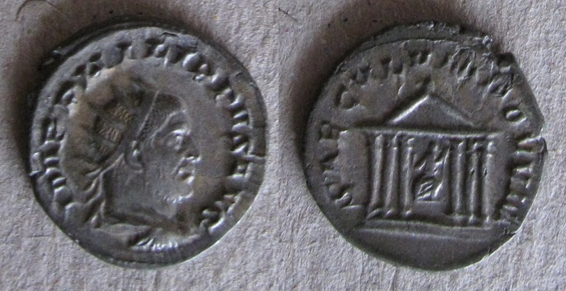 Antoninien de Philippe l'Arabe - 247 - Revers SAECVLVM NOVVM Temple de Vénus et Rome - Cohen198